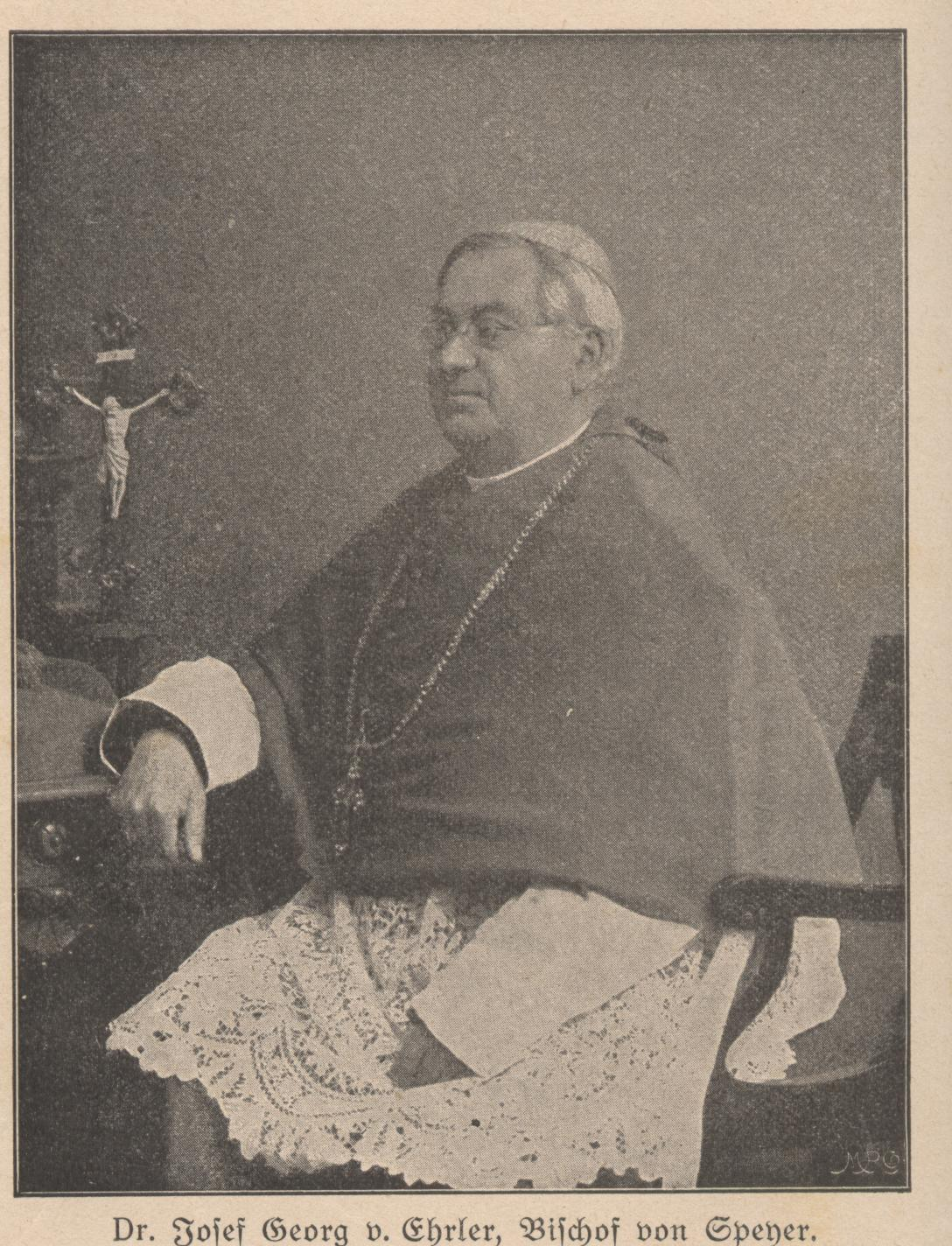 Bischof Georg von Ehrler, Speyer